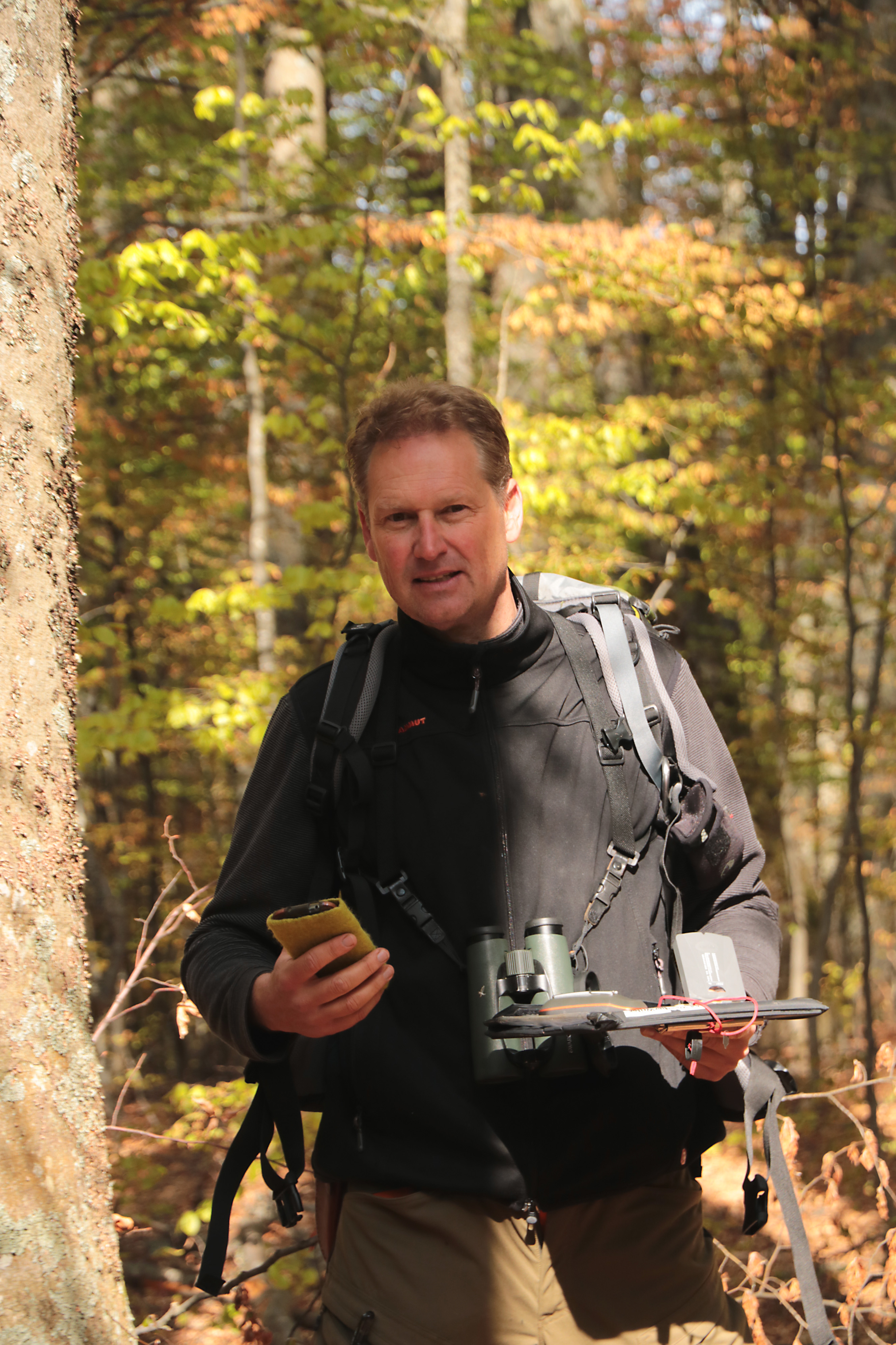 Volker Zahner 2016 in den rumänischen Karpathen.